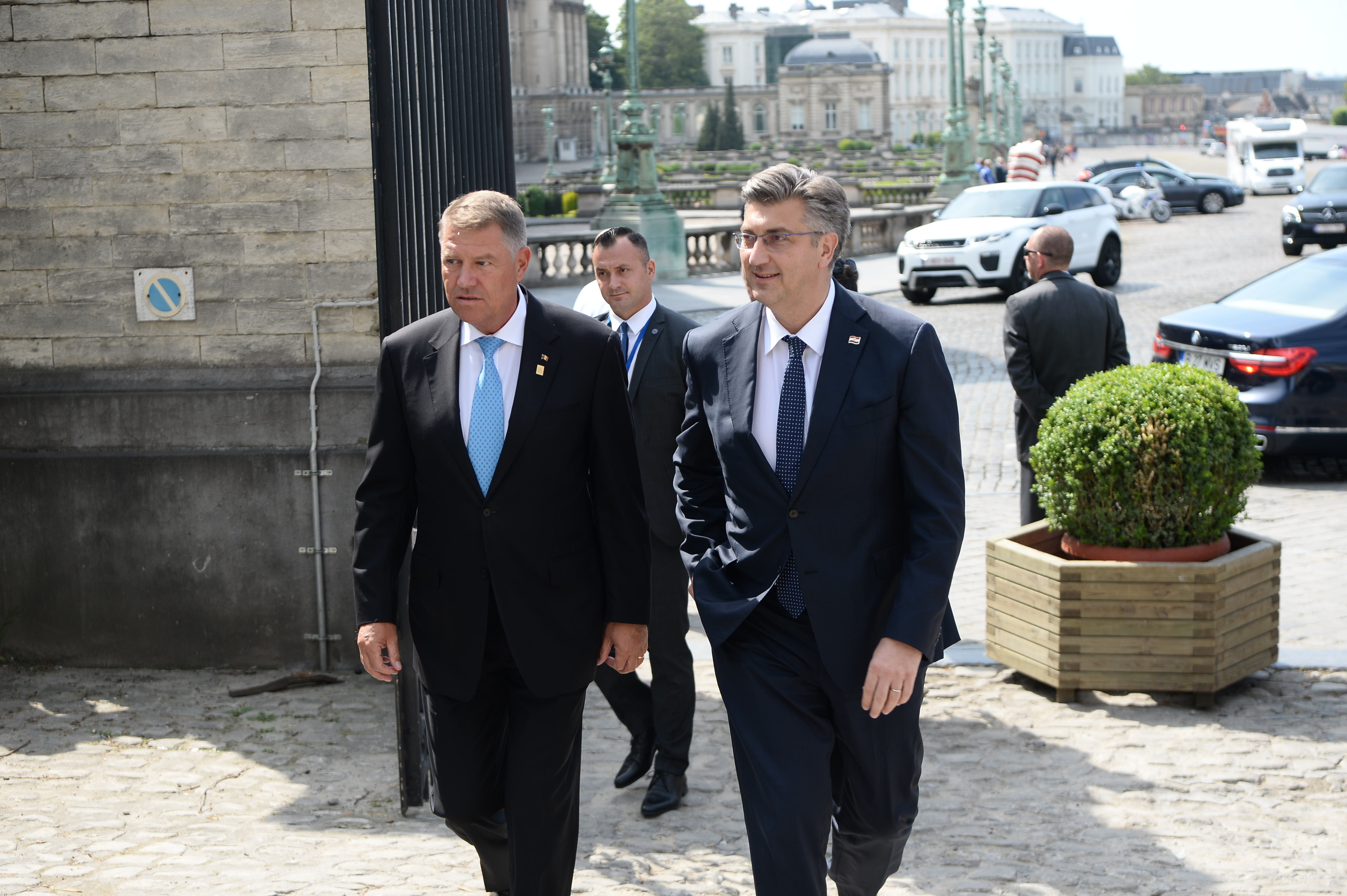 EPP Summit, Brussels, 30 June 2019